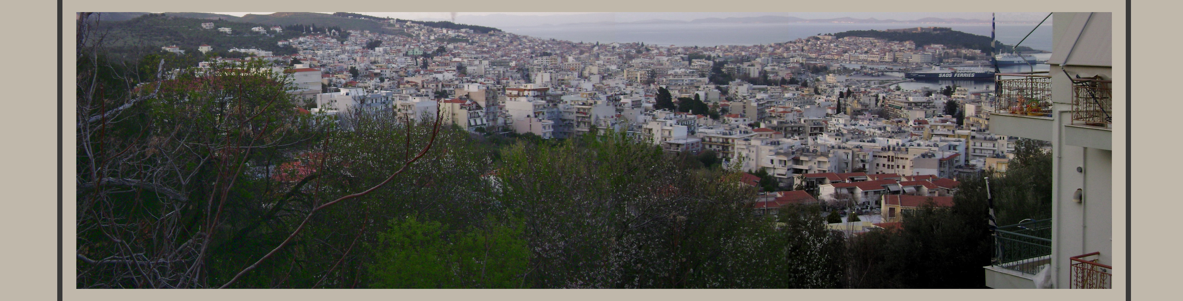 Mytilini city, Panoramic